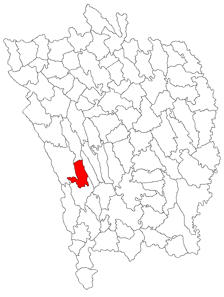 Categorie:Hărţi ale judeţului Vaslui